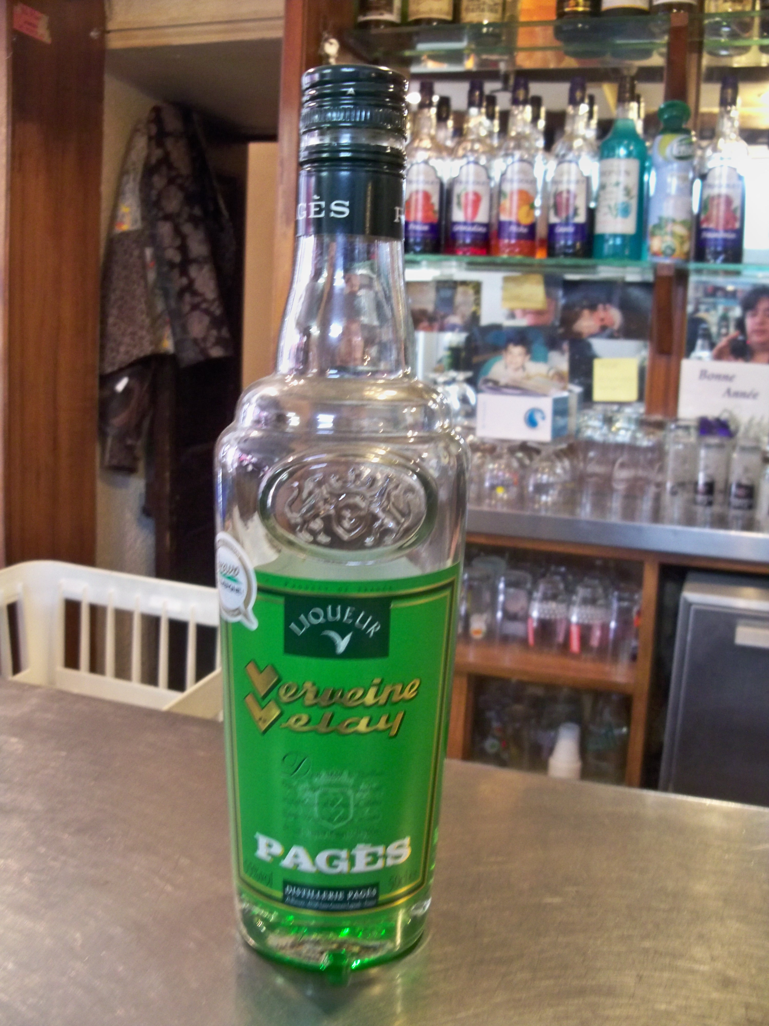 bouteille de Verveine Vervey